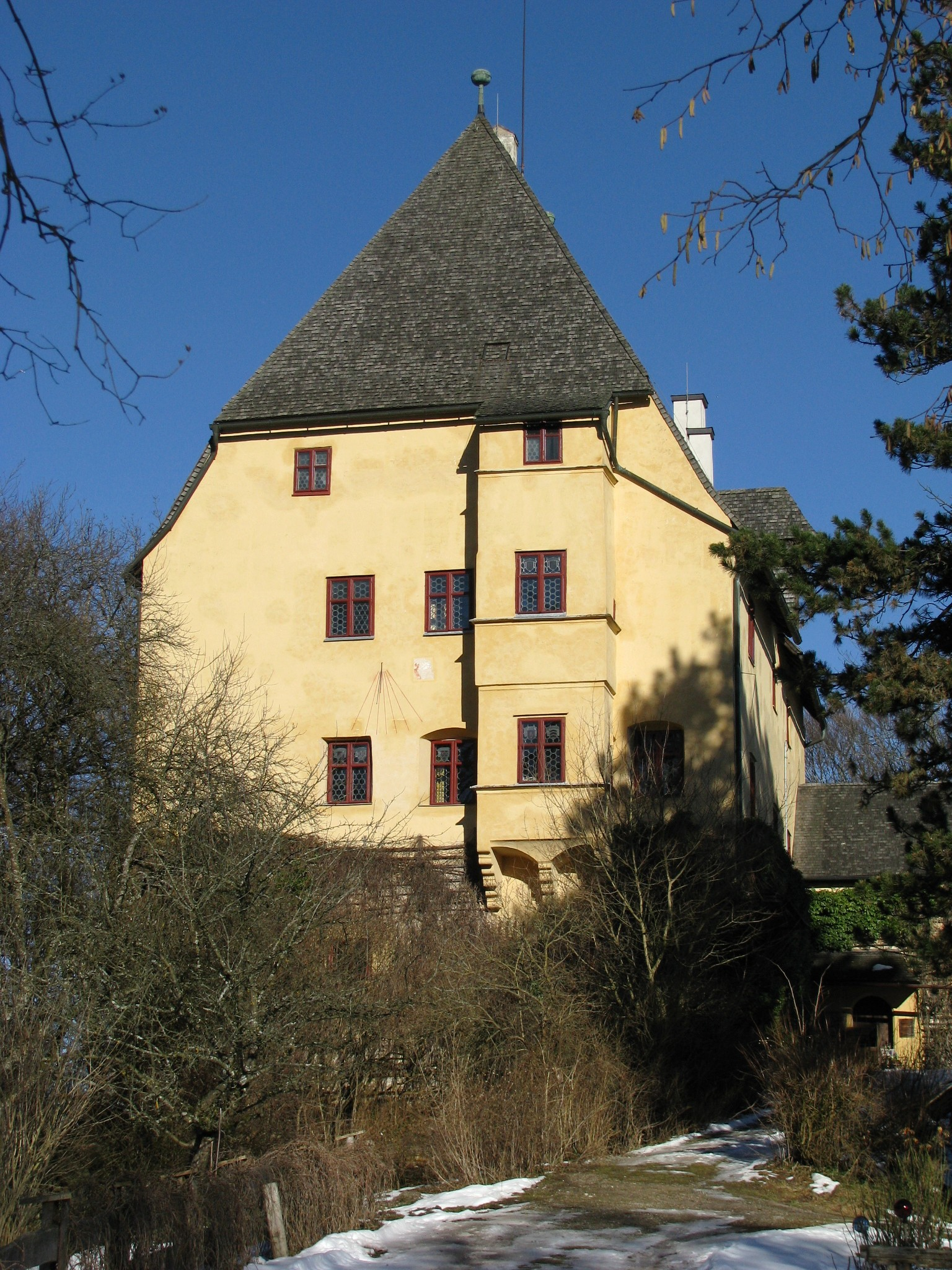 Schloss Harmating von Süden